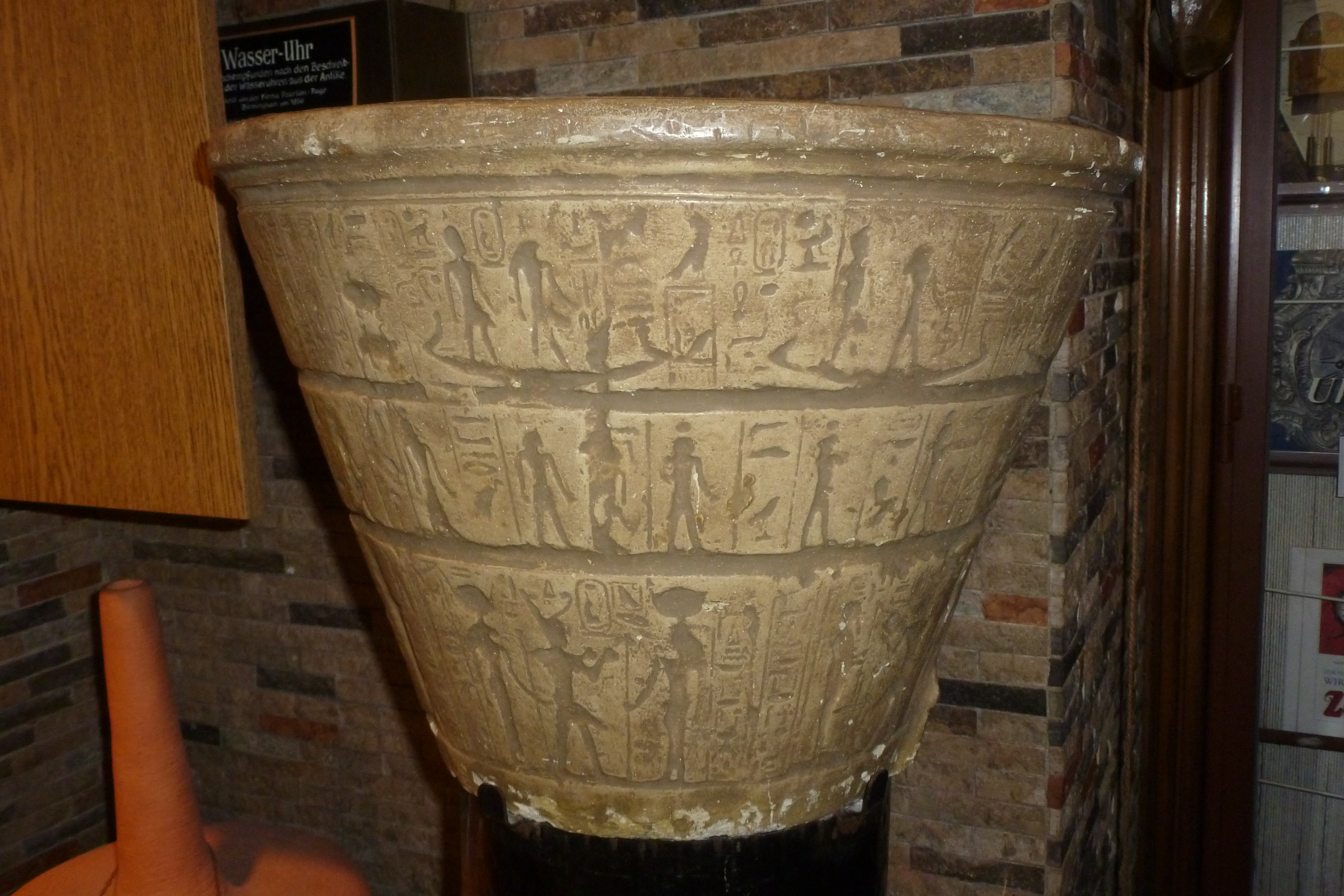 Ausstellungsstück im Wuppertaler Uhrenmuseums bei Juwelier Abeler in Wuppertal, Poststr. 11